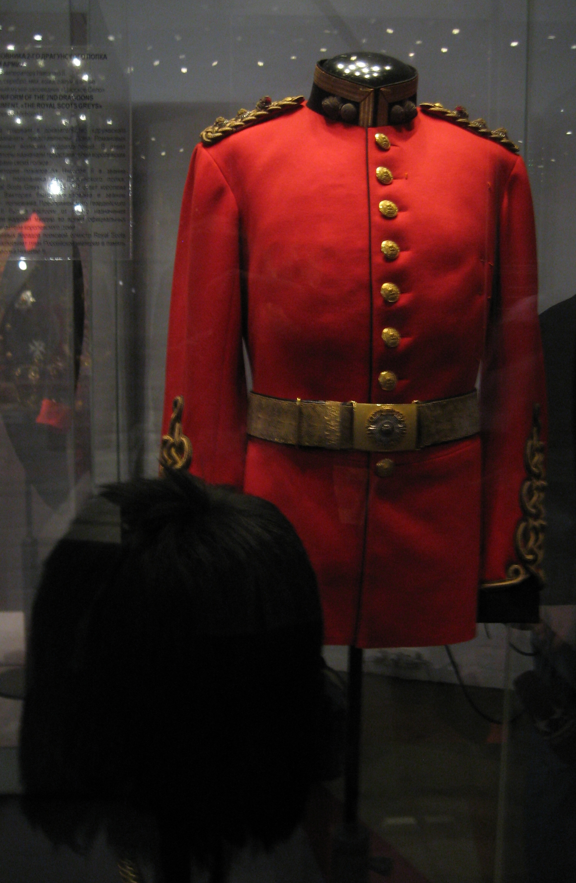 Форма полковника 2-го драгунского полка Британской армии. Принадлежала Николаю II. Царское село. Colonel's uniform of the 2nd Dragoons Guards regiment The Royal Scots greys. Belonged to Nicholas II of Russia